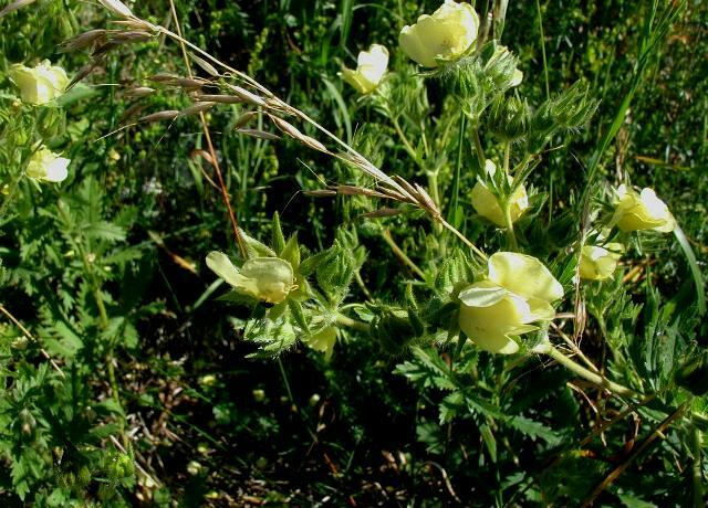 Potentilla recta